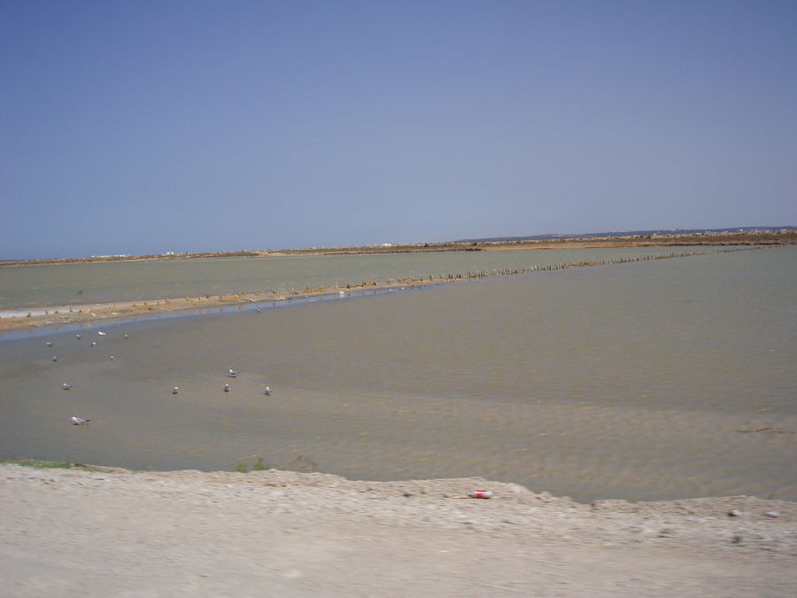 Salines á Sahline